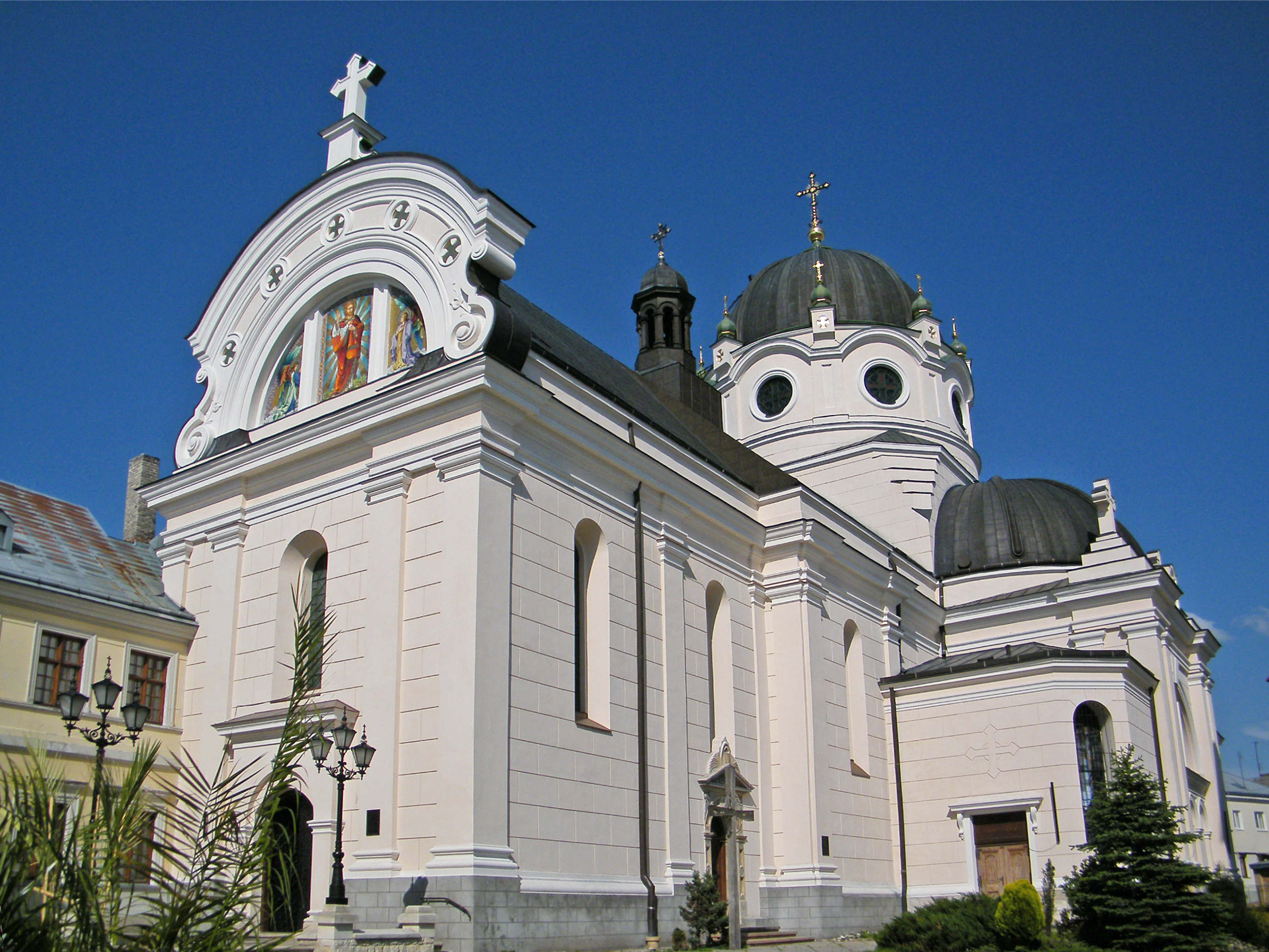 Храм Пресвятого Сердца Христова в Василианском монастыре